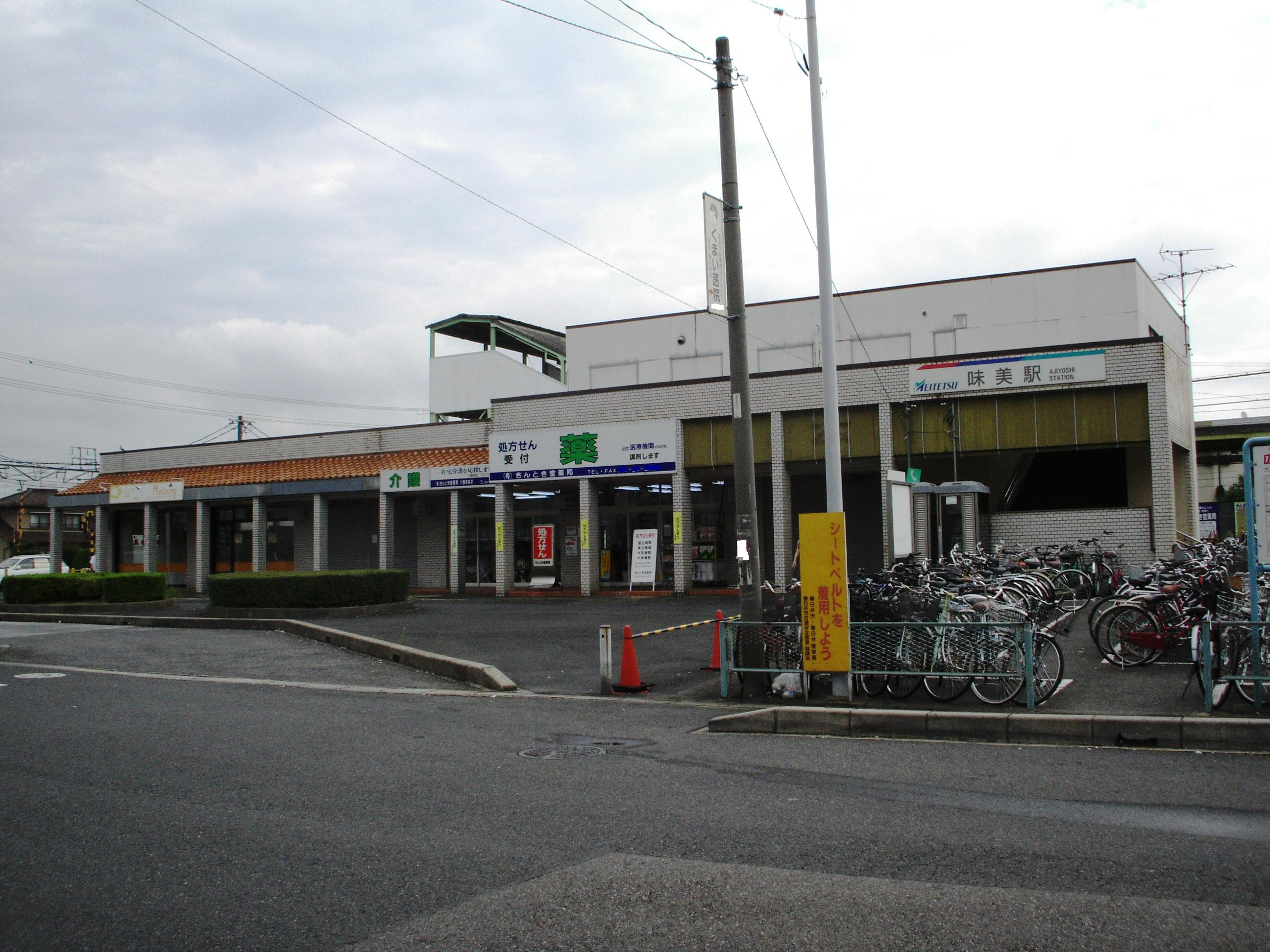 味美駅